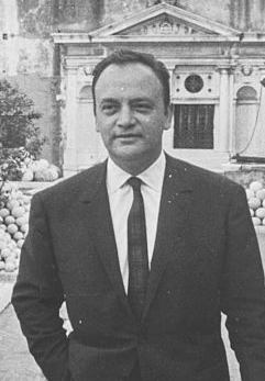 L'acteur français Raymond Pellegrin en 1962, au château Saint-Ange à Rome, lors du tournage du film Vénus impériale (Venere Imperiale), le 30 mai 1962.